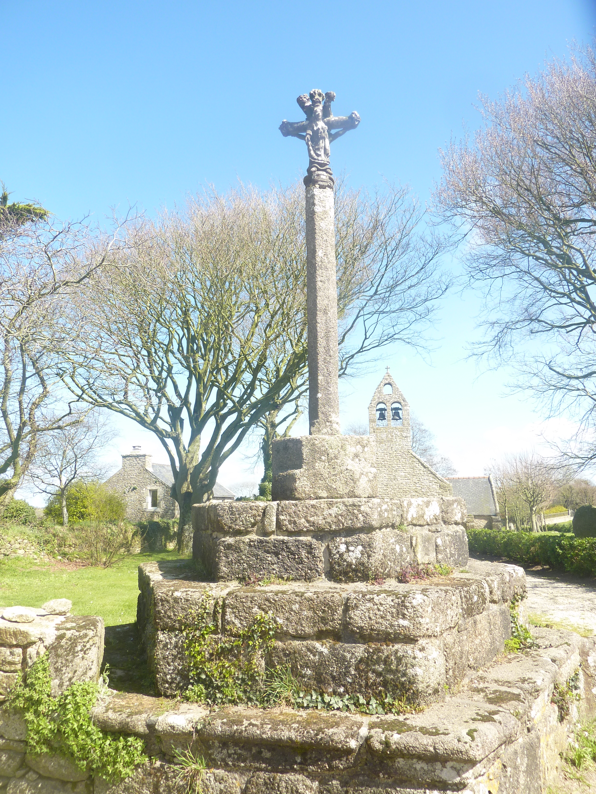 Calvaire situé dans l'enclos paroissial de l'église Saint-Léonor de Larret (ancienne paroisse et commune désormais rattachée à Pospoder).